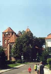 zdjęcie własne